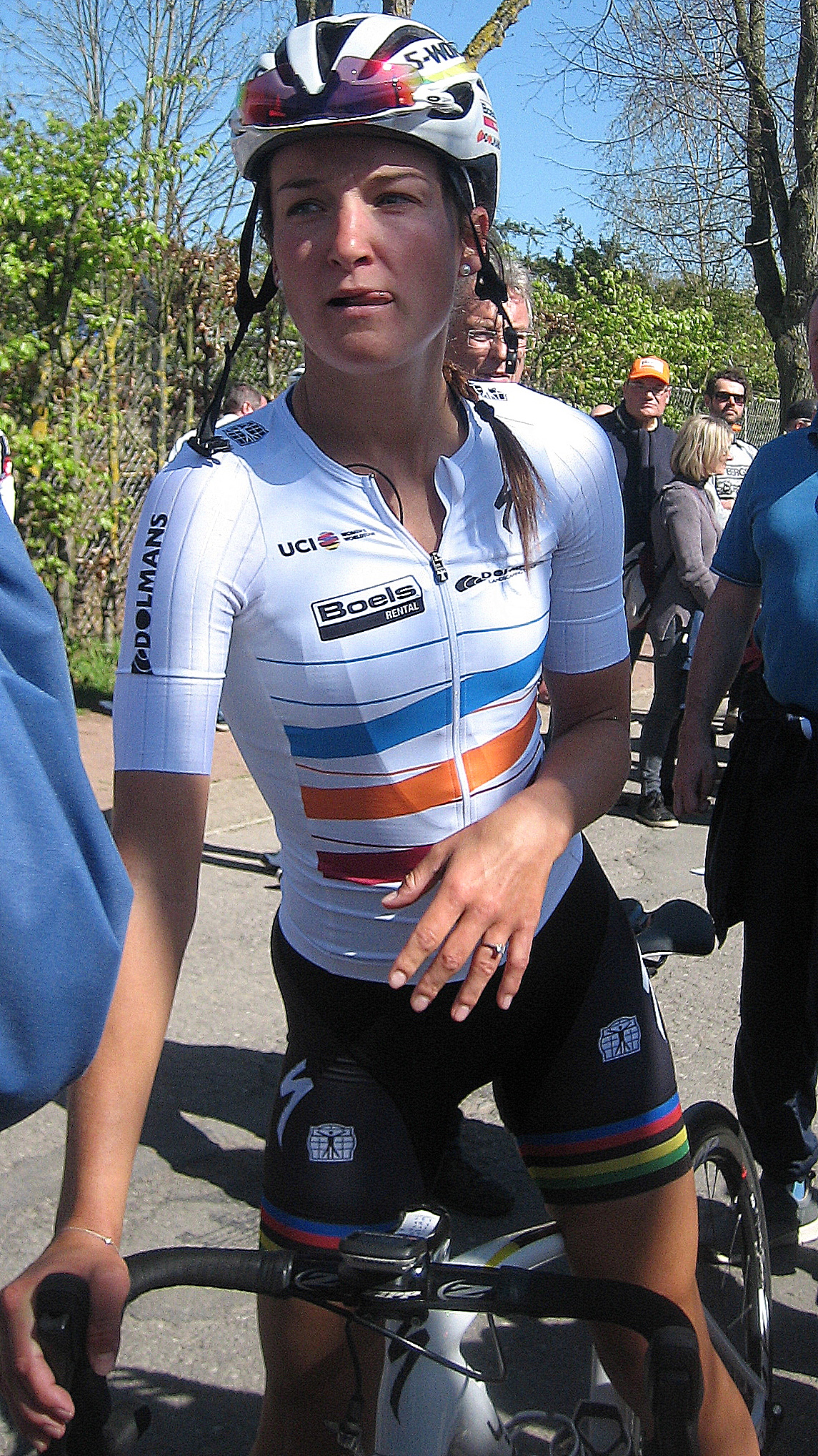 Elizabeth Armitstead (Boels Dolmans) na finish Waalse Pijl 2016